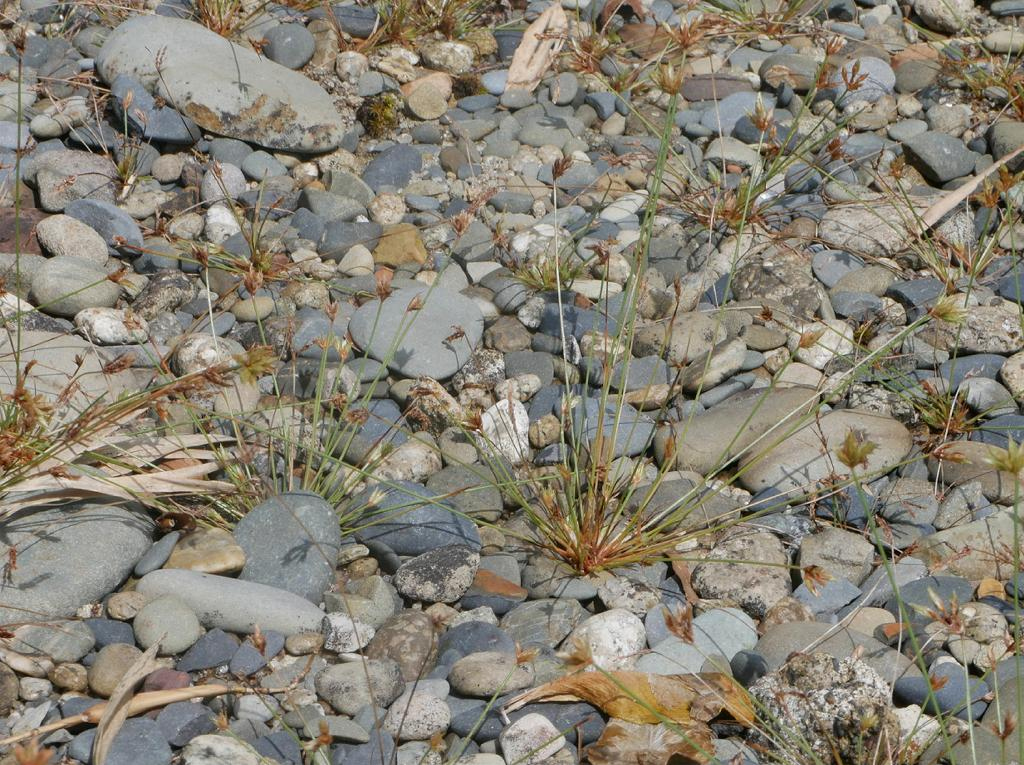 Bulbostylis barbata：ハタガヤ 2018/09/10 和歌山県那智勝浦町：Nachikatuura Town. Wakayama Pref. Japan